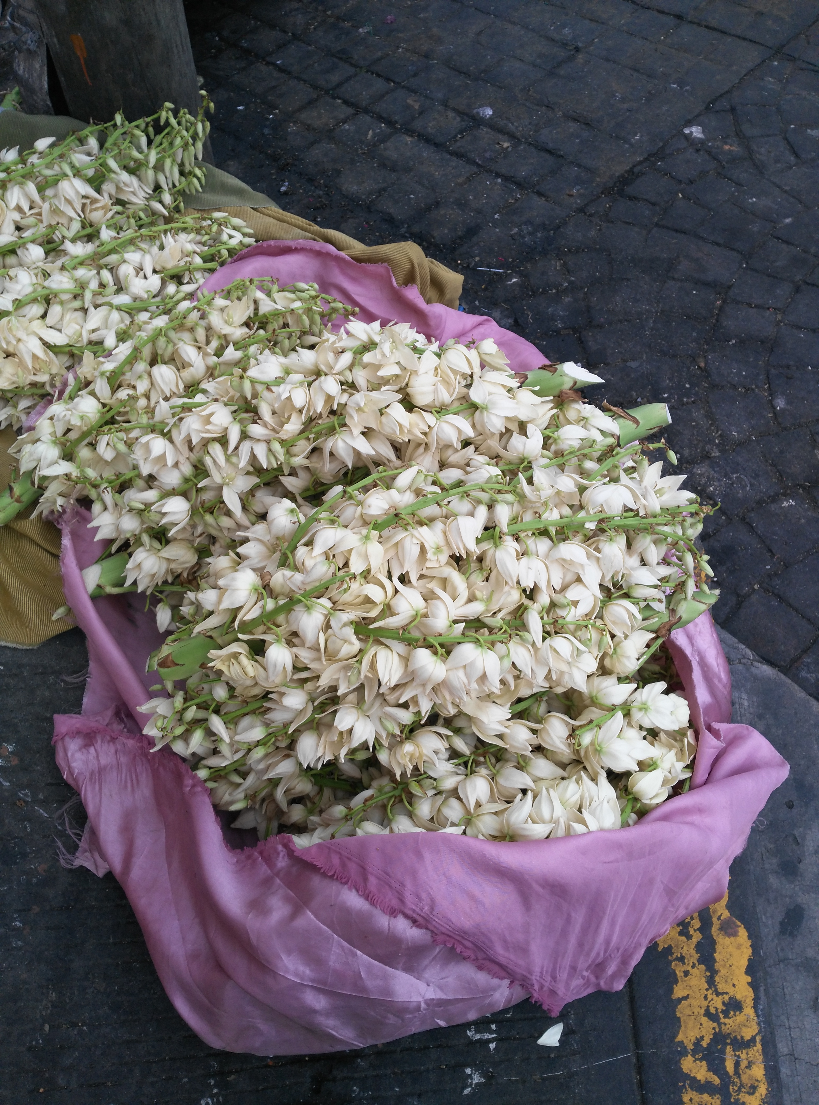 Flor comestible de México y centroamerica. Se da en Marzo y Abril.